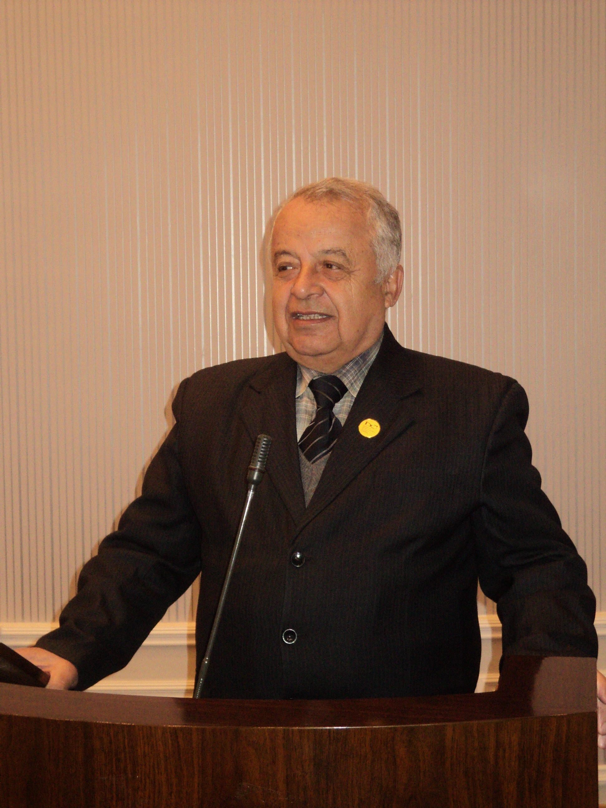 Хотамов Намоз Басарович, профессор, доктор исторических наук (Таджикистан) Тоҷикӣ: Намоз Басарович Ҳотамов, профессор, доктори илмҳои таърих (Тоҷикистон)